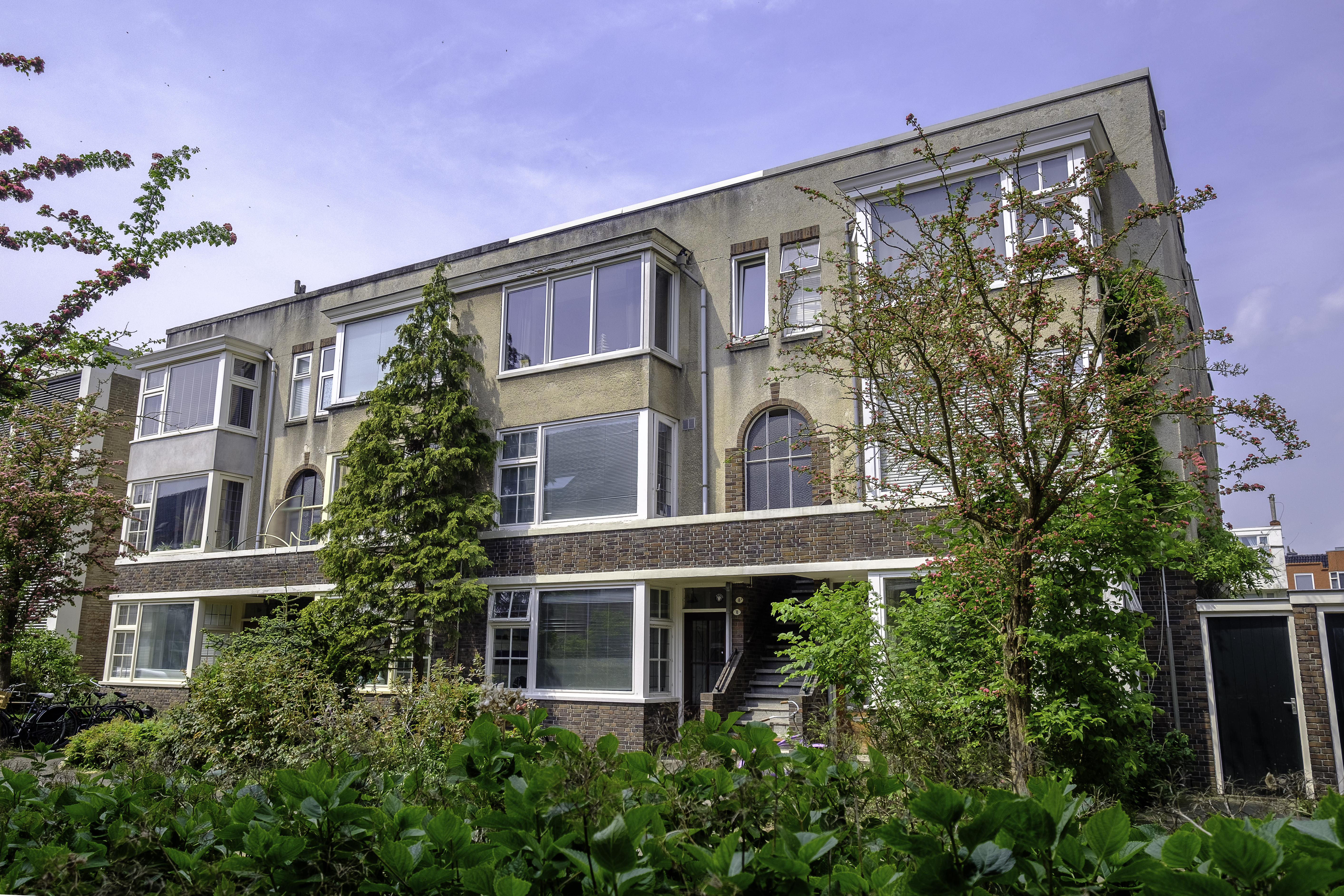 Portieketagewoningen van Kuiler & Drewes aan de C.H. Petersstraat 4-10 in Groningen.